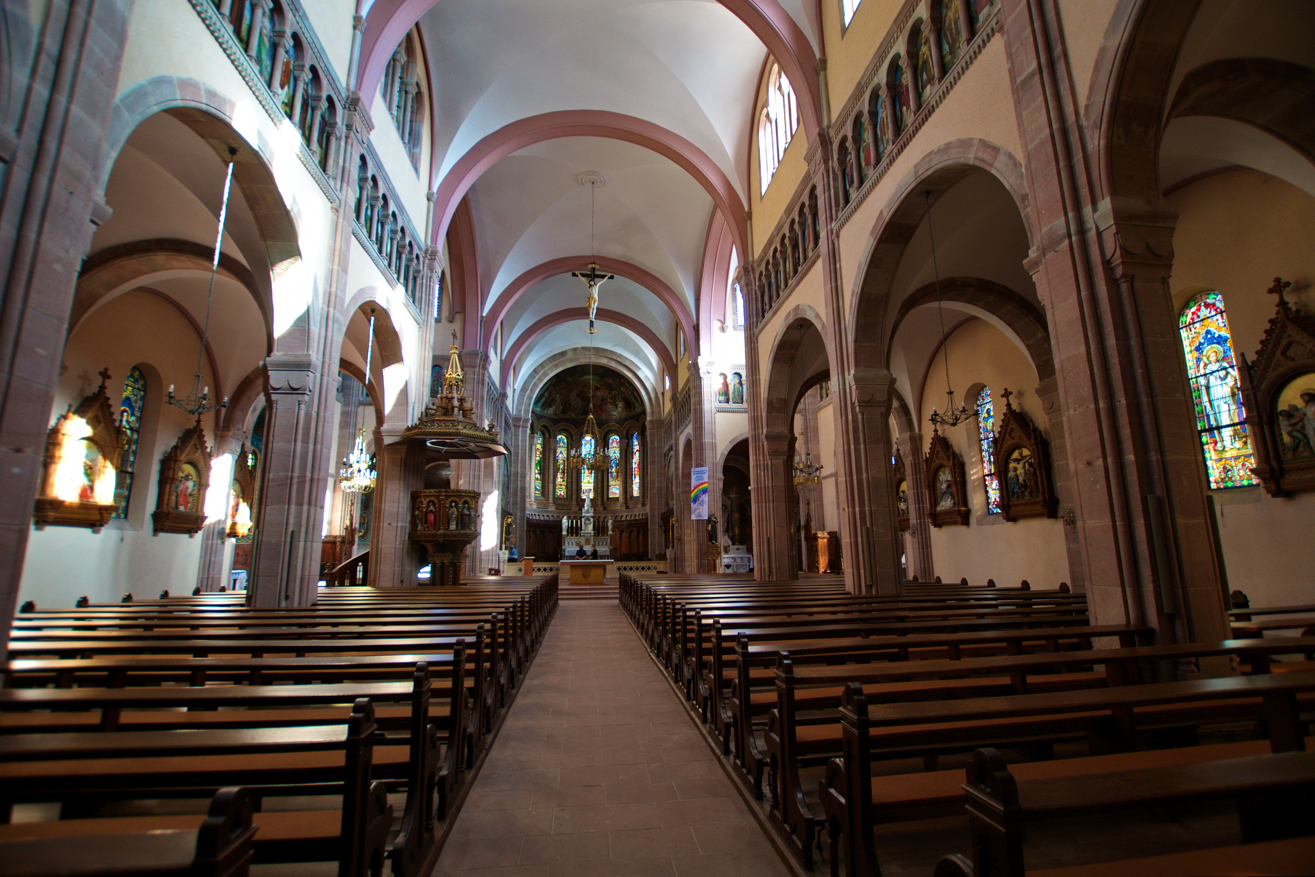 Église Saint-Pantaleon de Gueberschwihr, Place de Église (Classé, 1841) .